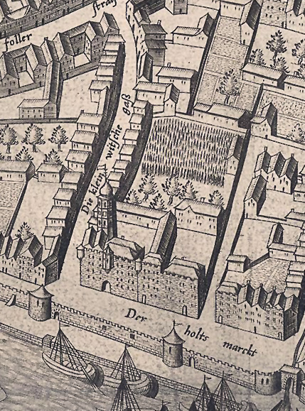 Anwesen der Familie von Siegen, Ausschnitt des Mercator - Stadtplanes, Bereich Holzmarkt.